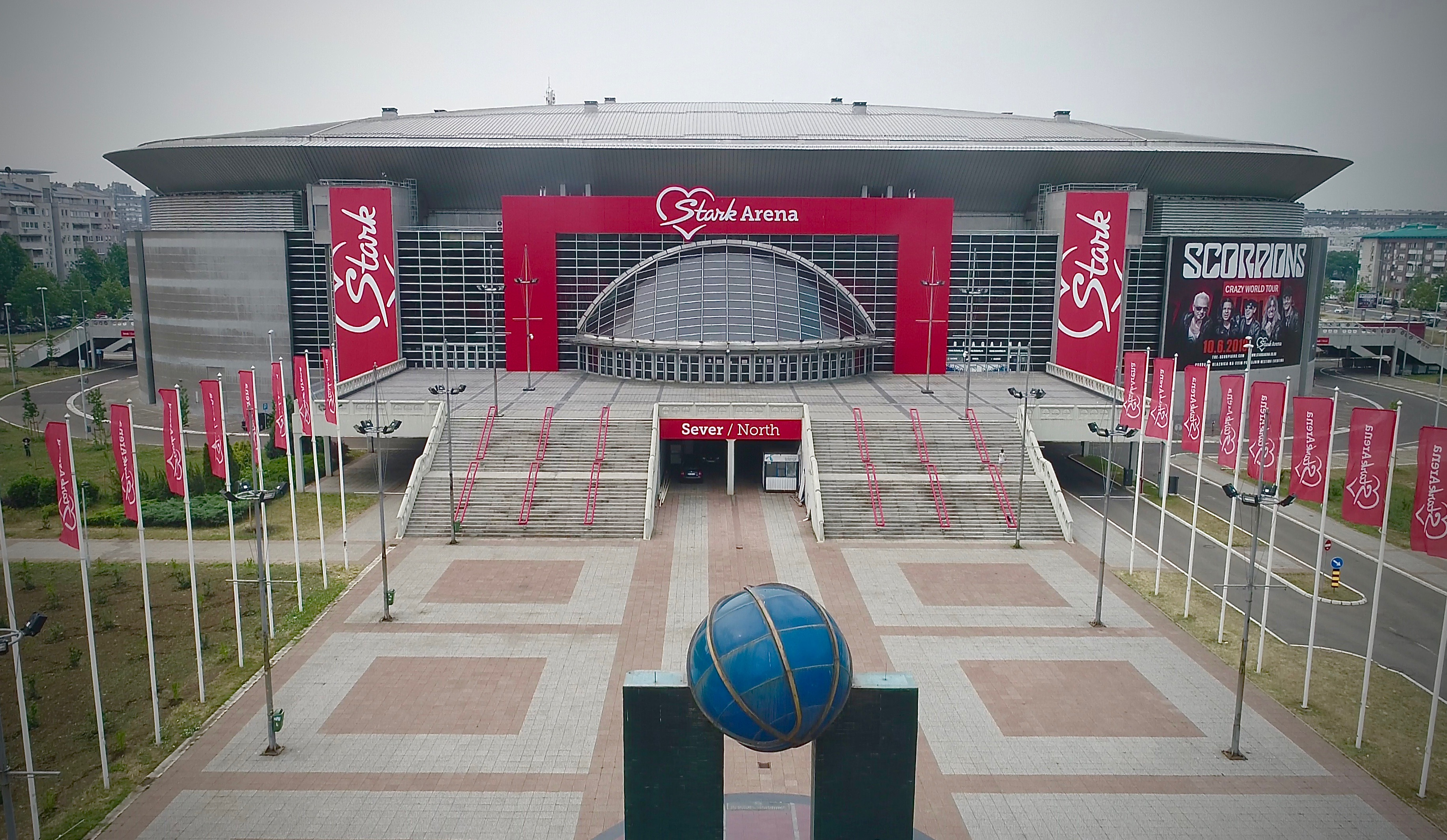 Fotografija Štark Arene